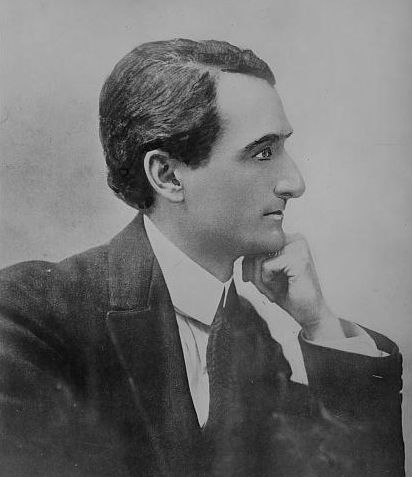 Italo Montemezzi (1875 - 1952), Italian composer